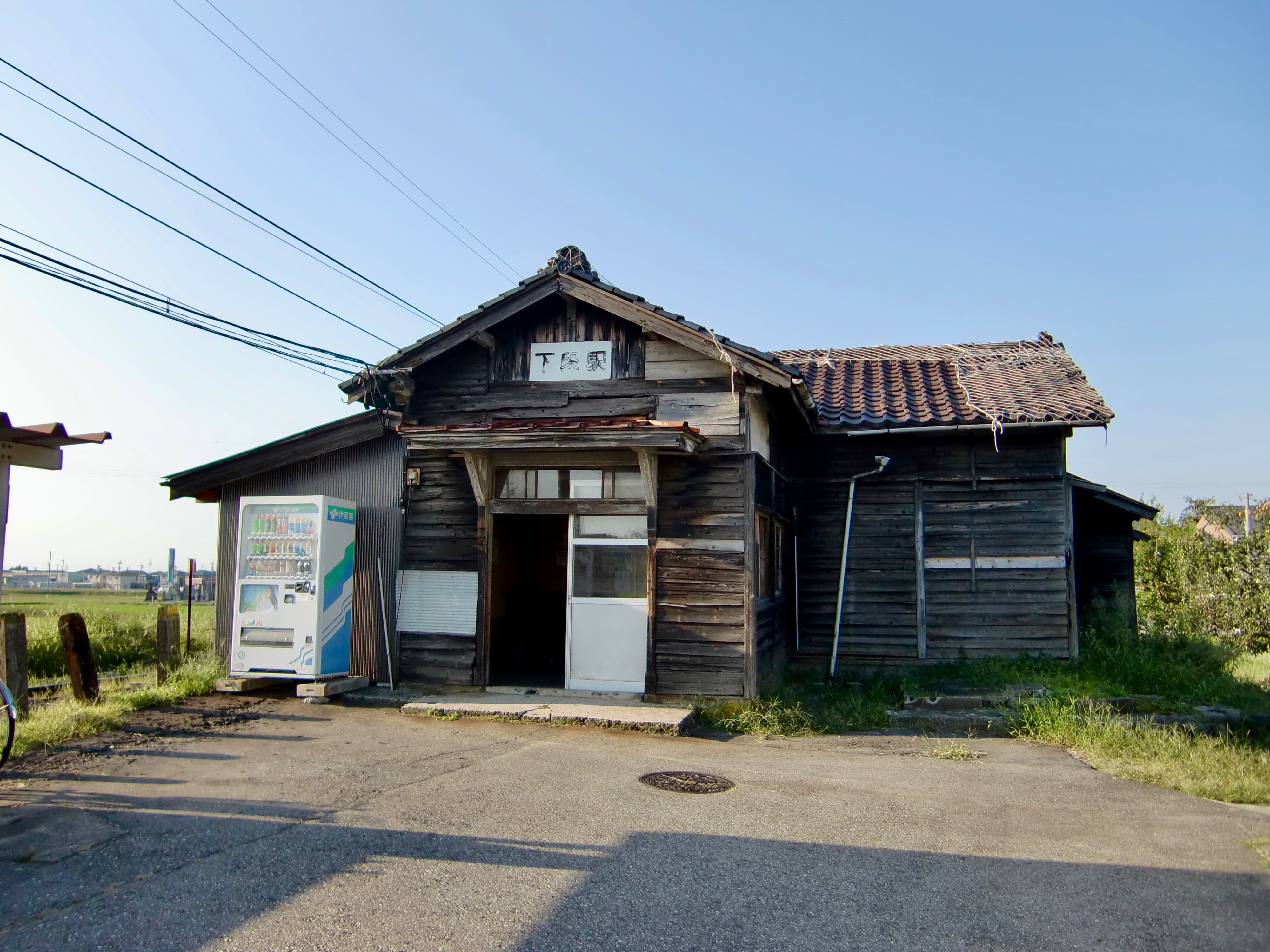 富山地方鉄道立山線下段駅